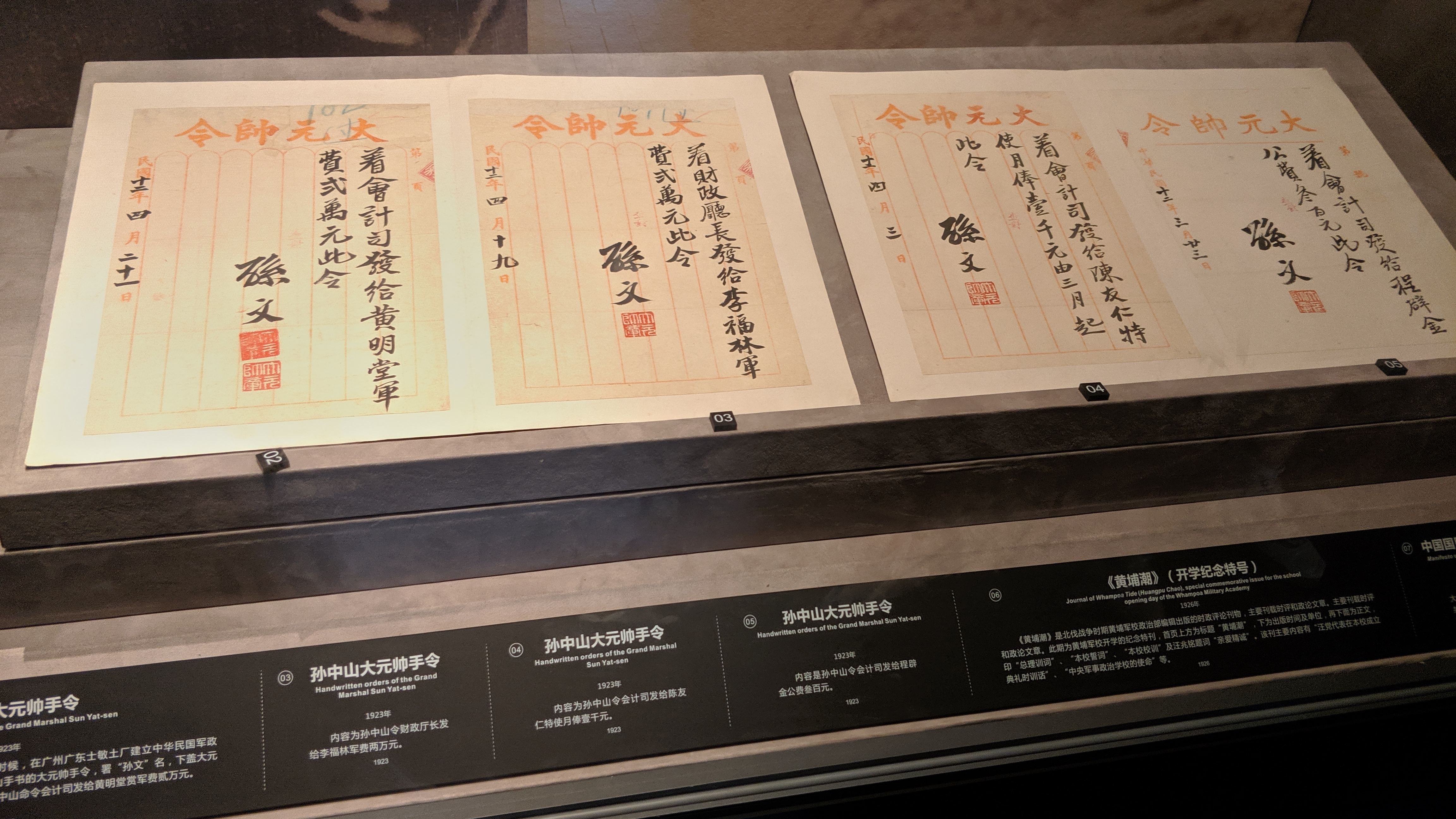 广州市博物馆馆藏_孙中山手令